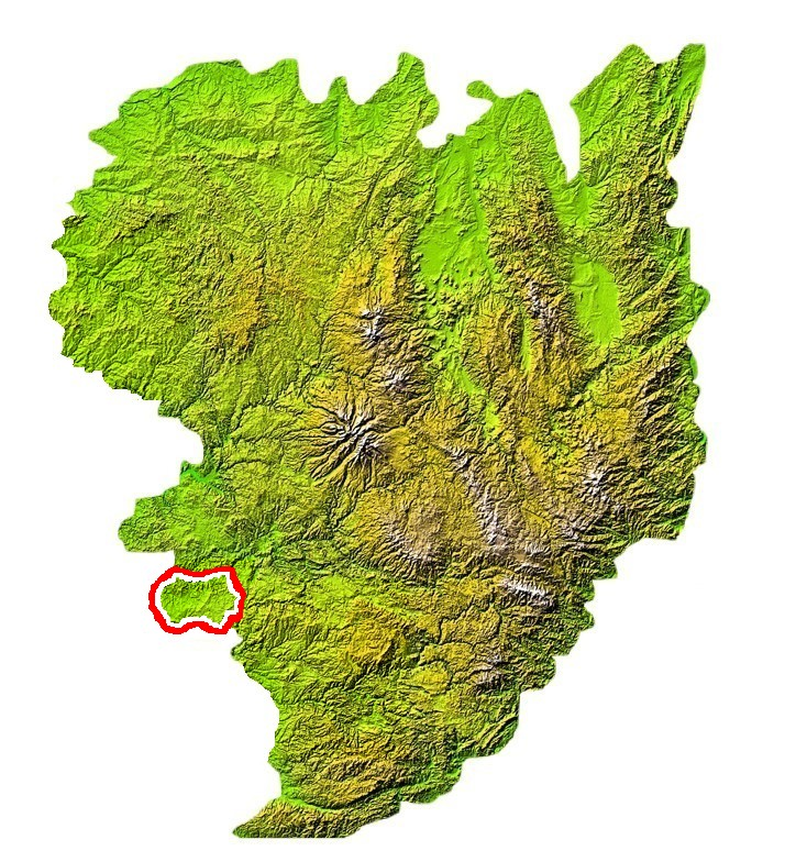 situation du causse de Limogne sur la carte du Massif central